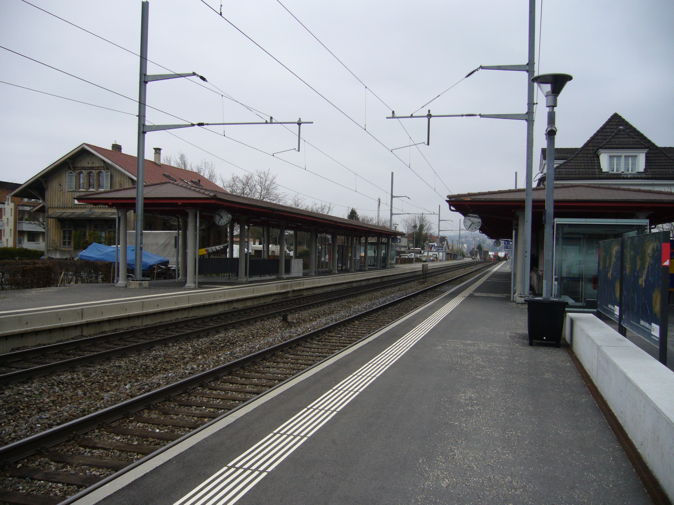 Station Oberrieden.